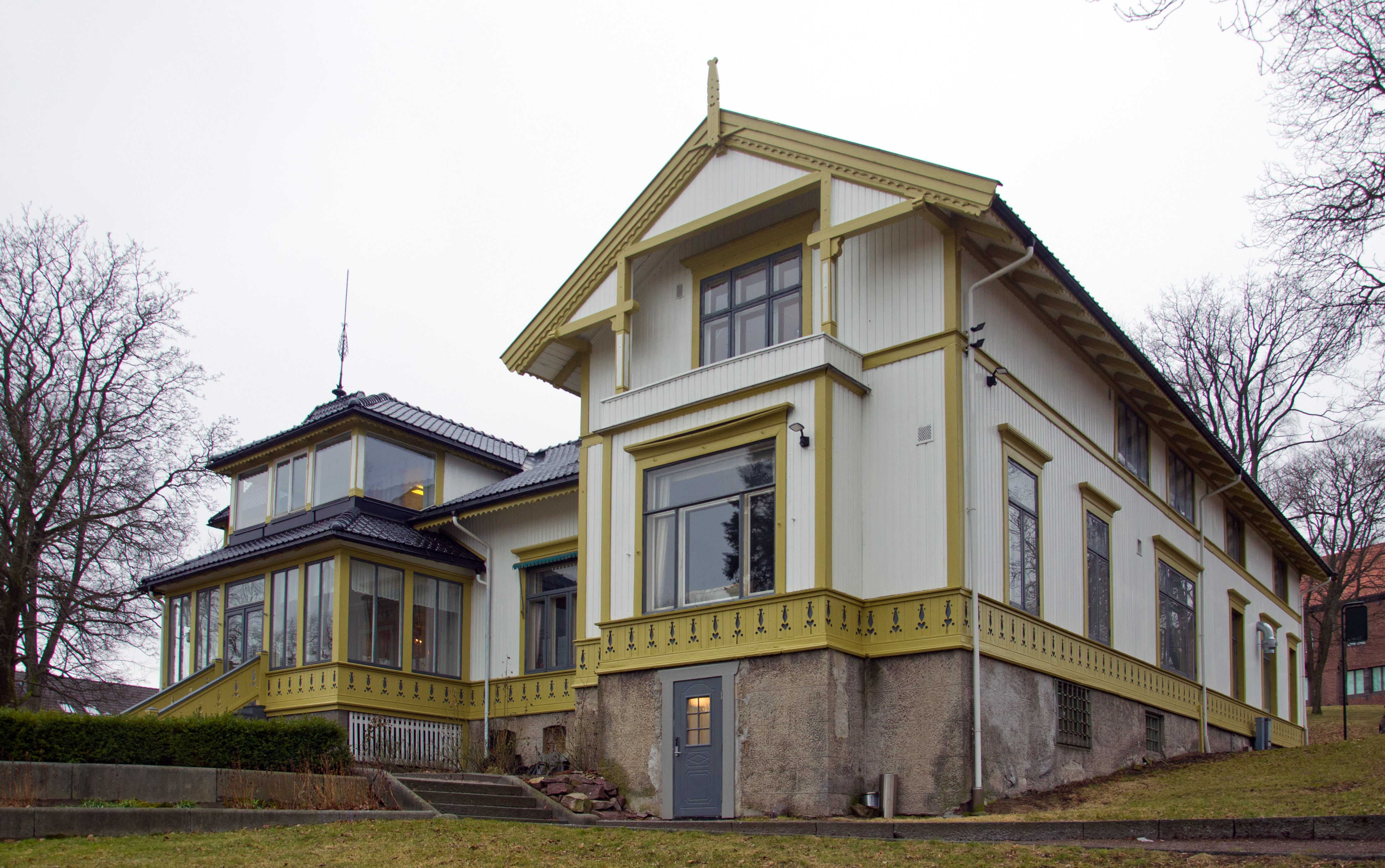 Villa Møllebakken, Tønsberg